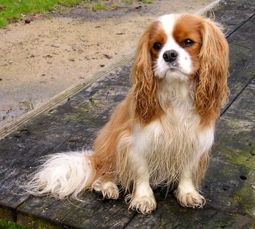 Cavalier King Charles Spaniel, Noble Nicholus ("Nikki") (Blenheim coat)